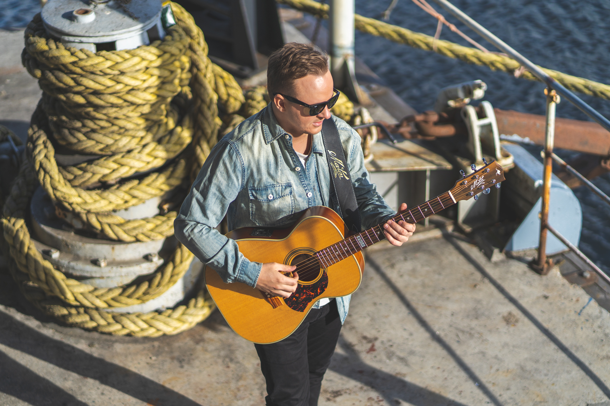 Jāni Bērziņu ģitāristu